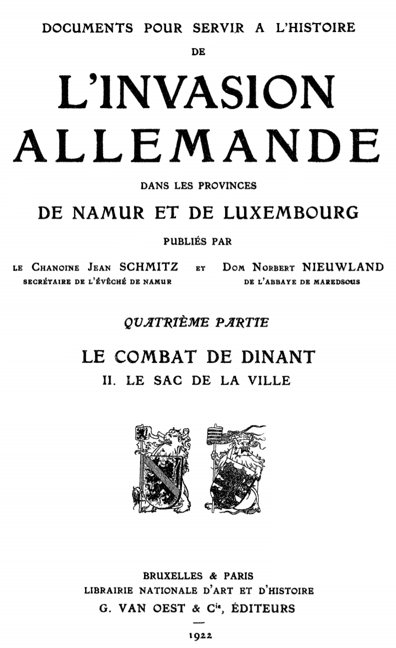 Ouvrage à propos du sac de la ville de Dinant publié en 1922.